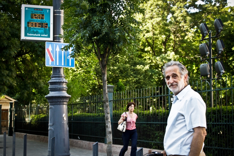 László János és a Múzeum körúti kerékpárszámláló